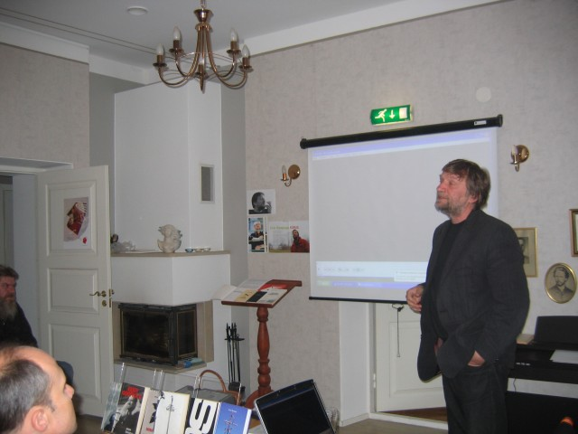 Ervin Õunapuu Haapsalus, a. 2010